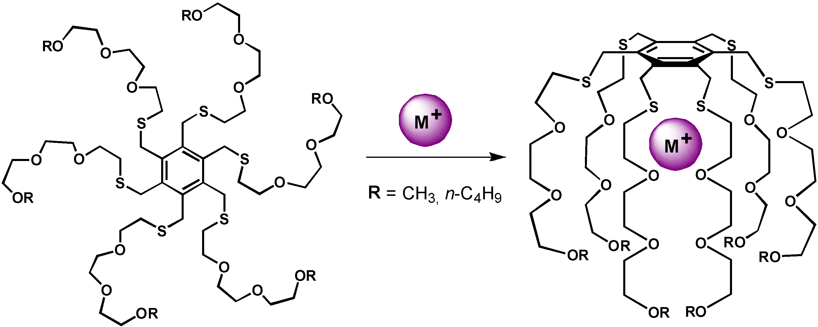 Krakenmolekül